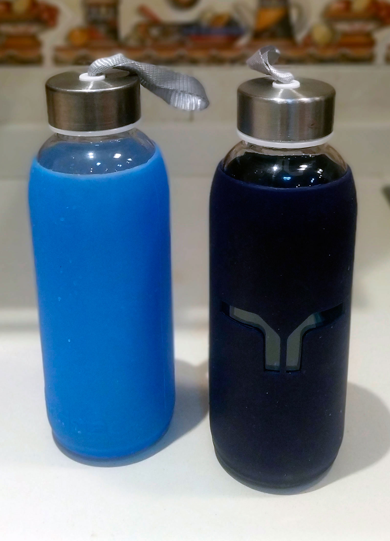 Dos botellas de cristal reutilizables con funda de silicona para protegerlas en caso de golpes leves